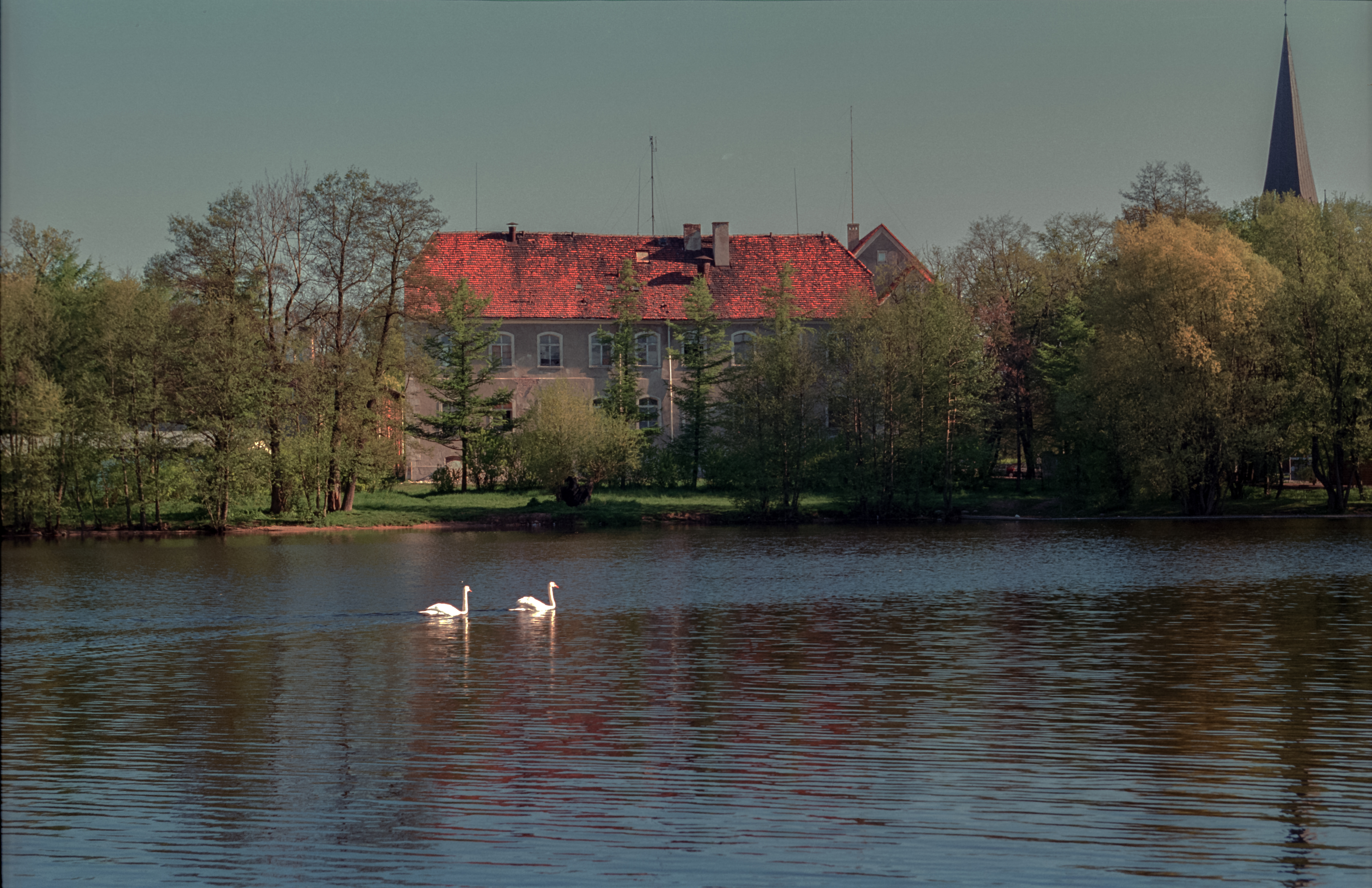 Szczecinek - zamek Książąt Pomorskich zbudowany przez Ulryka darłowskiego, (skrzydło południowe), mur., XV, 1690, XVIII, XX w.